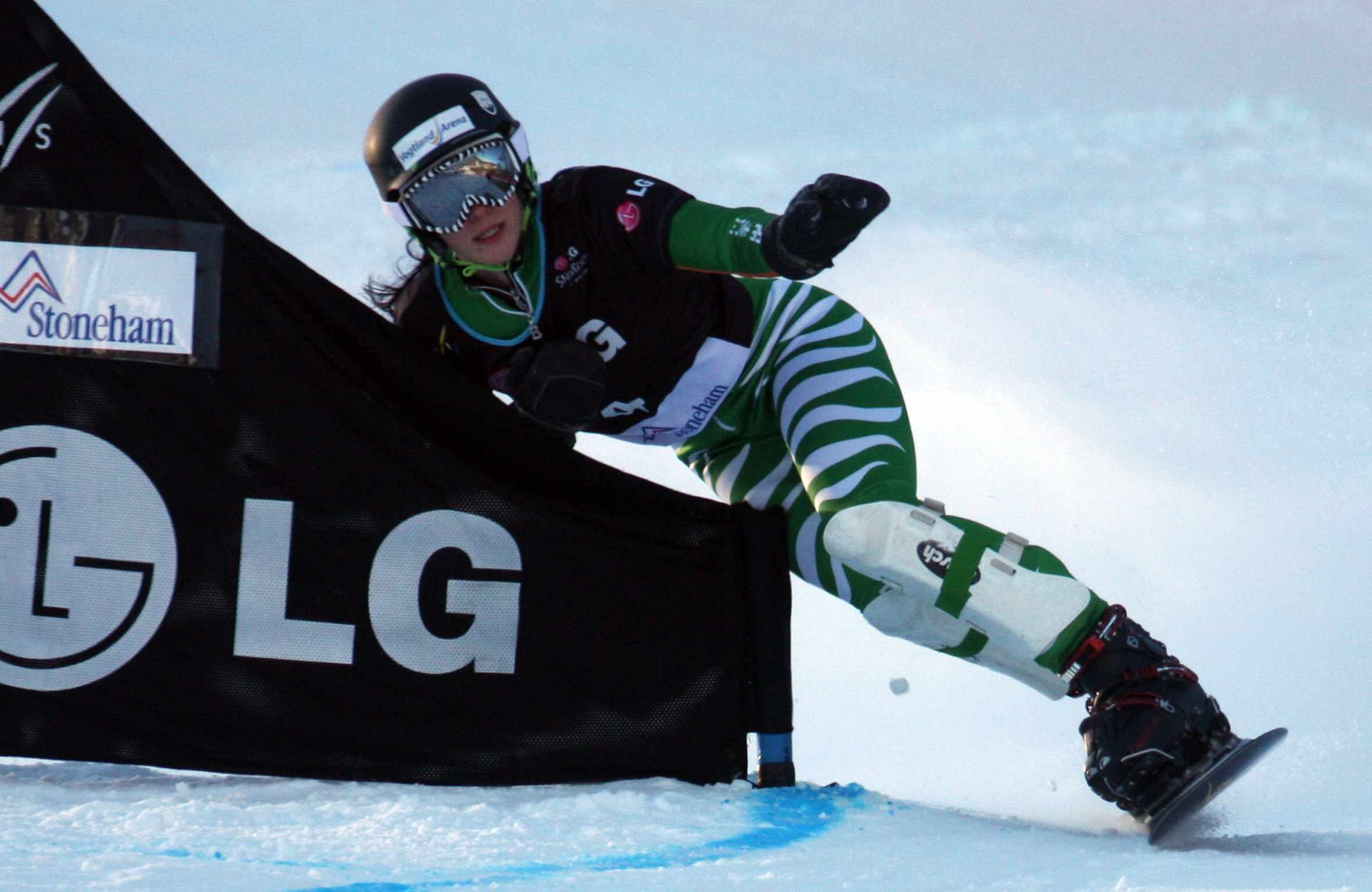 Stoneham_PGS_Isabella_Laboeck_GER